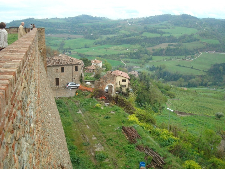 Roncofreddo (Italie)- La rocca de Sorrivoli, panorama depuis la terrasse interne du château